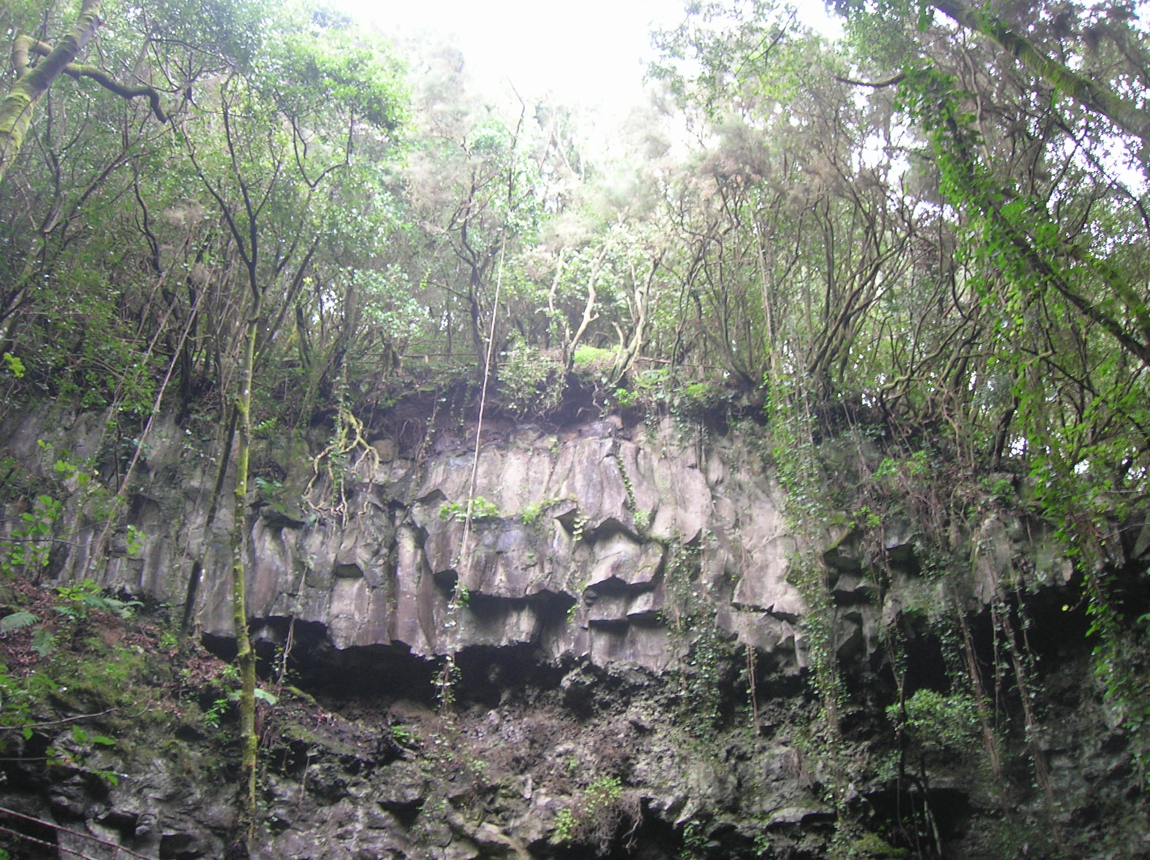 Laurierboswandeling in de kloof La Zarza, La Palma